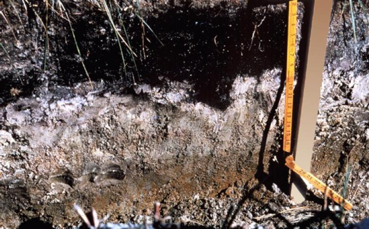 USDA - Soil Taxonomy